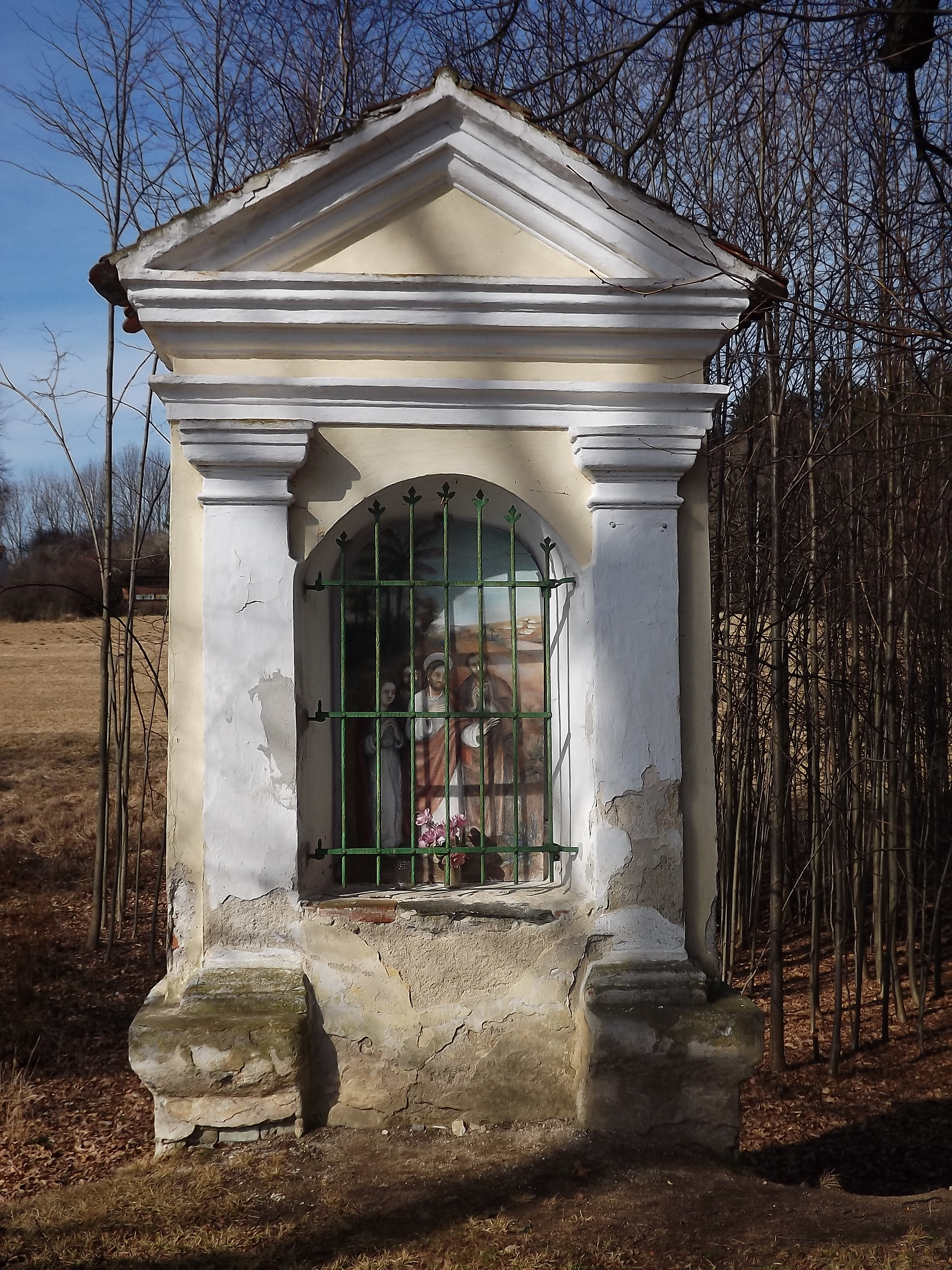 Křížová cesta - 25 zastavení (Římov), Dolní Římov, Římov Tento obrázek byl nahrán v rámci projektu Wiki miluje památky 2012. Afrikaans | Alemannisch | العربية | جازايرية | azərbaycanca | Bikol Central | беларуская | беларуская (тарашкевіца) | български | বাংলা | brezhoneg | català | čeština | Cymraeg | dansk | davvisámegiella | Deutsch | Zazaki | Ελληνικά | English | Esperanto | español | eesti | euskara | فارسی | suomi | français | Frysk | Gaeilge | galego | עברית | हिन्दी | hrvatski | magyar | հայերեն | Bahasa Indonesia | Ido | italiano | 日本語 | ქართული | 한국어 | Кыргызча | Lëtzebuergesch | latviešu | Malagasy | македонски | മലയാളം | Bahasa Melayu | Malti | नेपाली | Nederlands | norsk bokmål | norsk nynorsk | polski | português | português do Brasil | română | русский | sicilianu | slovenčina | slovenščina | shqip | српски / srpski | svenska | ไทย | Tagalog | Türkçe | українська | اردو | 中文 | 中文（中国大陆） | 中文（简体） | 中文（繁體） | 中文（香港） | 中文（台灣） |+/−